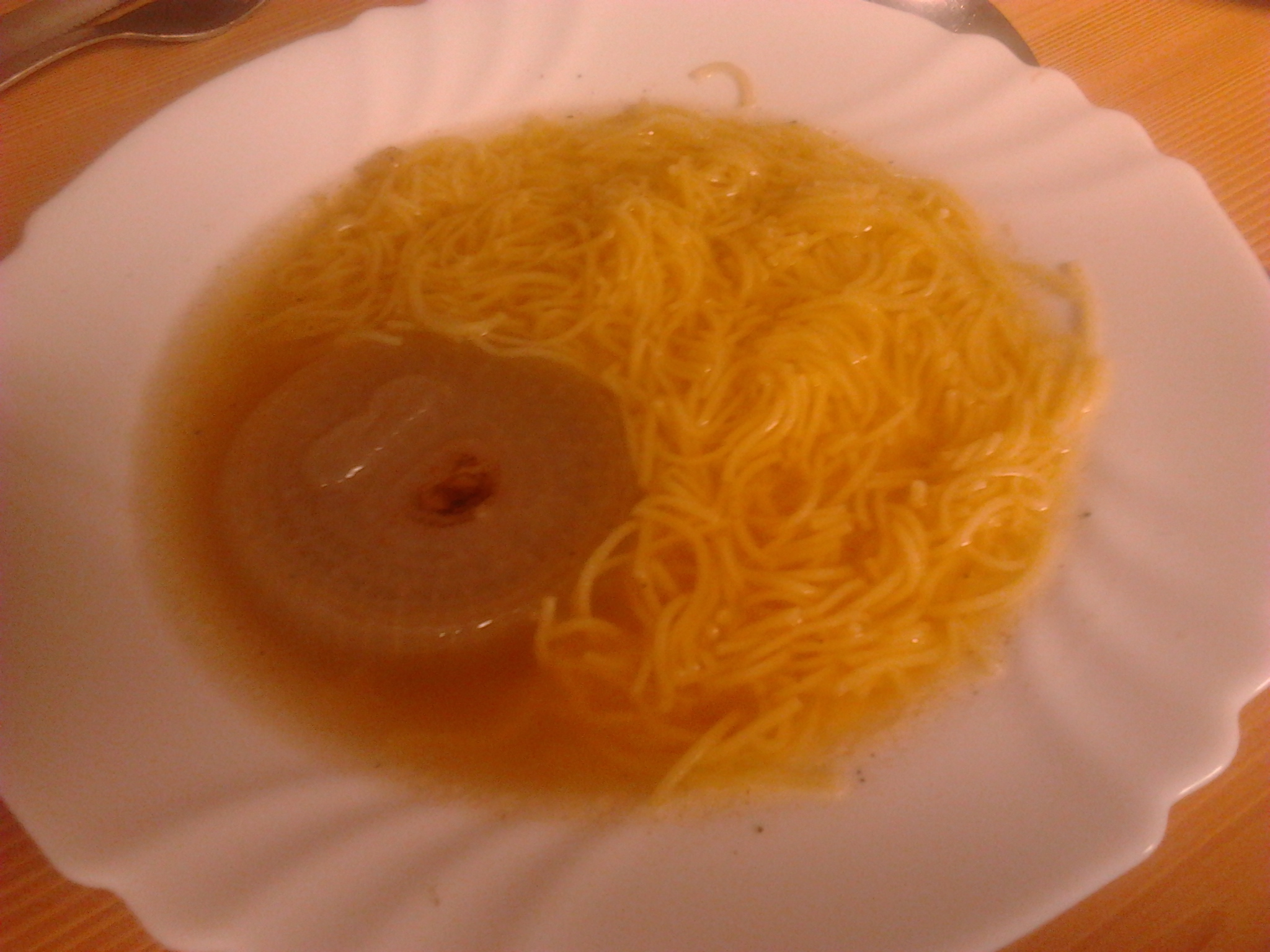 Goveja juha z rezanci.